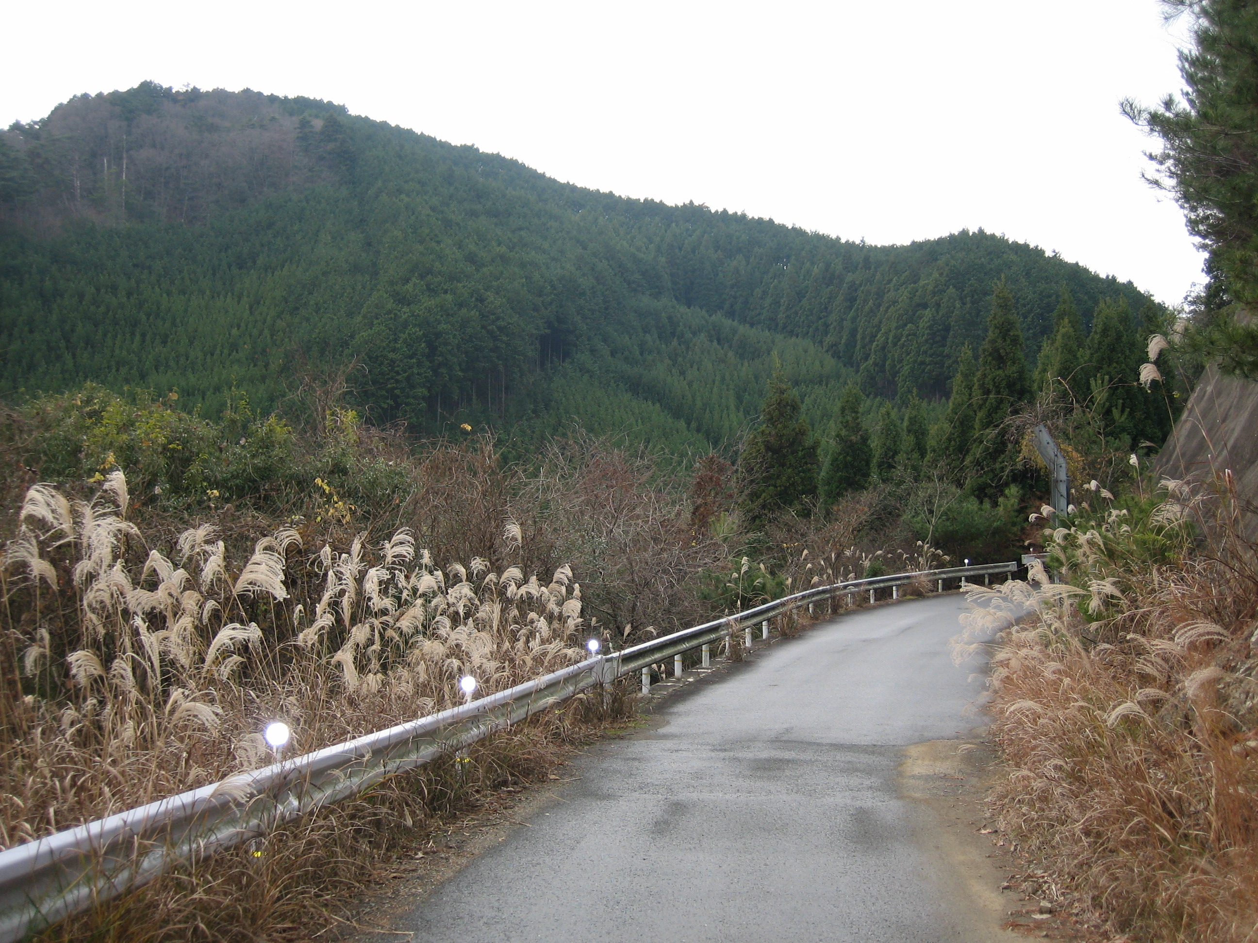 持越峠頂上付近の道路を撮影